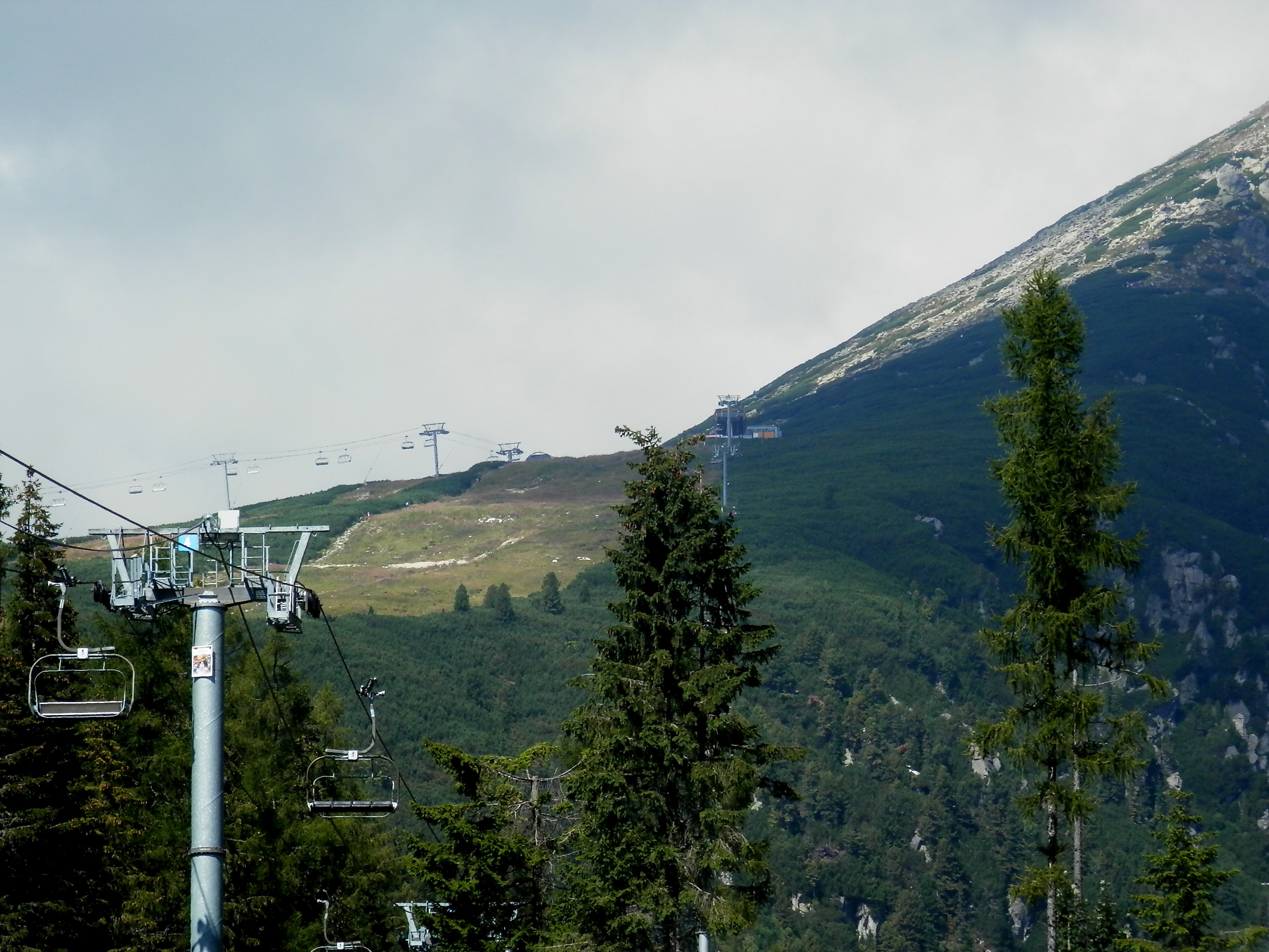 Lyžiarsky areál FIS. Vysokohorská osada s názvom Štrbské Pleso. Leží v nadmorskej výške asi 1 350 metrov. Obec Štrba, okres Poprad. Leto 2016